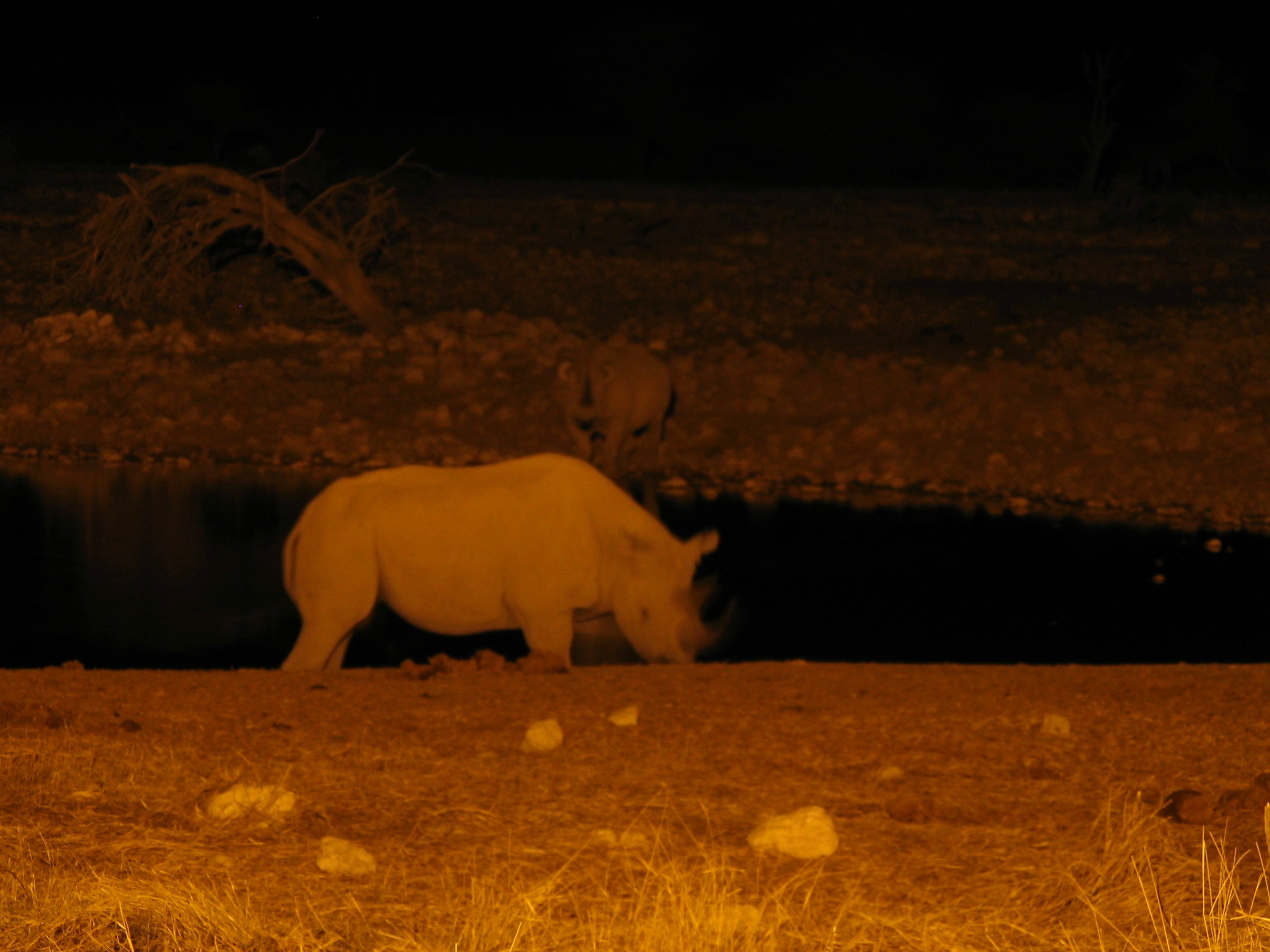 Okaukuejo water hole at night, Etosha, Namiba